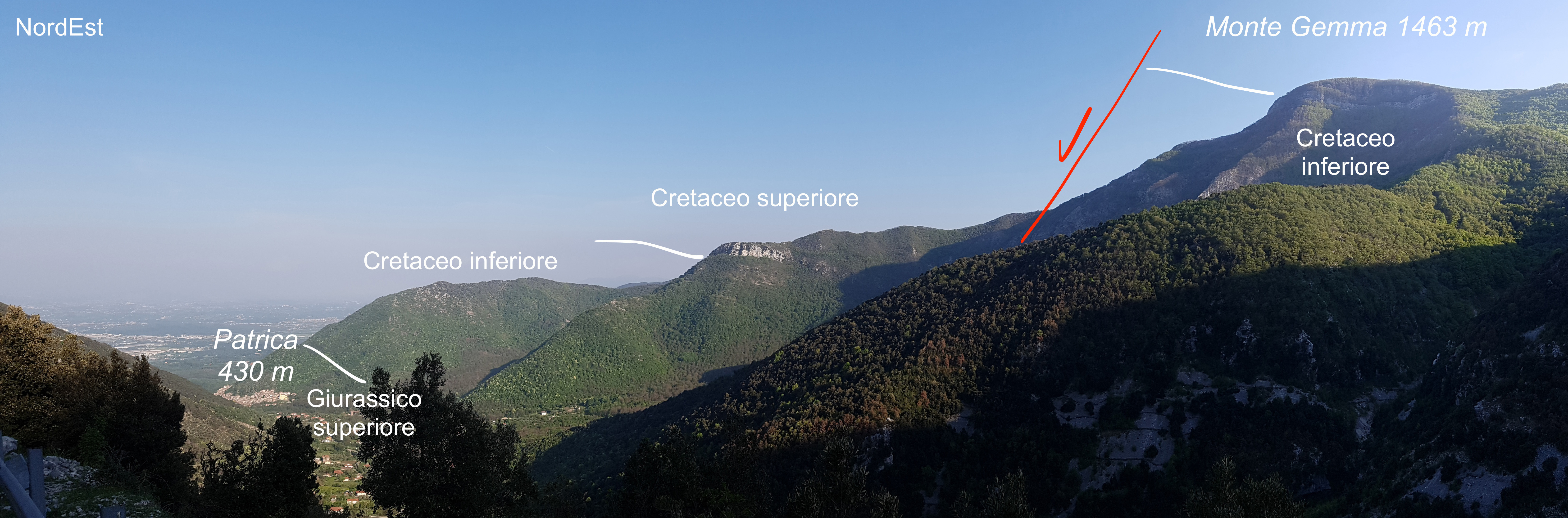 Geopanorama strada Supino - Santa Serena. Il panorama mostra in linee bianche i limiti stratigrafici tra i calcari di diversa età oggi esposti e sedimentati nel corso del Mesozoico dal Giurassico superiore al Cretaceo (da circa 150 a 80 milioni di anni). La linea rossa invece corrisponde alla traccia della faglia la cui mezzafreccia indica il blocco ribassato e la ripetizione dei limiti stratigrafici. Il gradino generato è il prodotto dell'ultima e la più recente delle fasi tettoniche che hanno interessato l'Appennino di cui i Monti Volsci son parte: la distensione. Questa è legata all'assottigliamento della crosta terrestre un tempo in compressione. Nel corso soprattutto del Quaternario (ultimi 2 milioni di anni circa), la distensione dell'Appennino ha permesso la formazione del graben (fossa) della Ciociaria e l'innalzamento definitivo della catena.